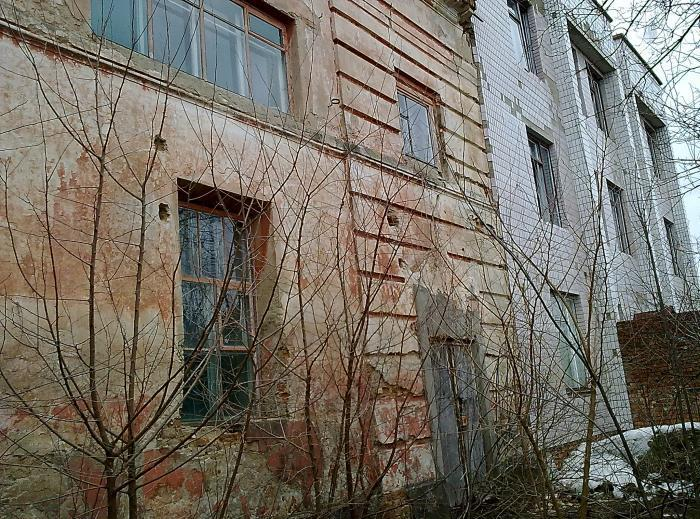 Залишки костьолу святого Яна Непомуцена